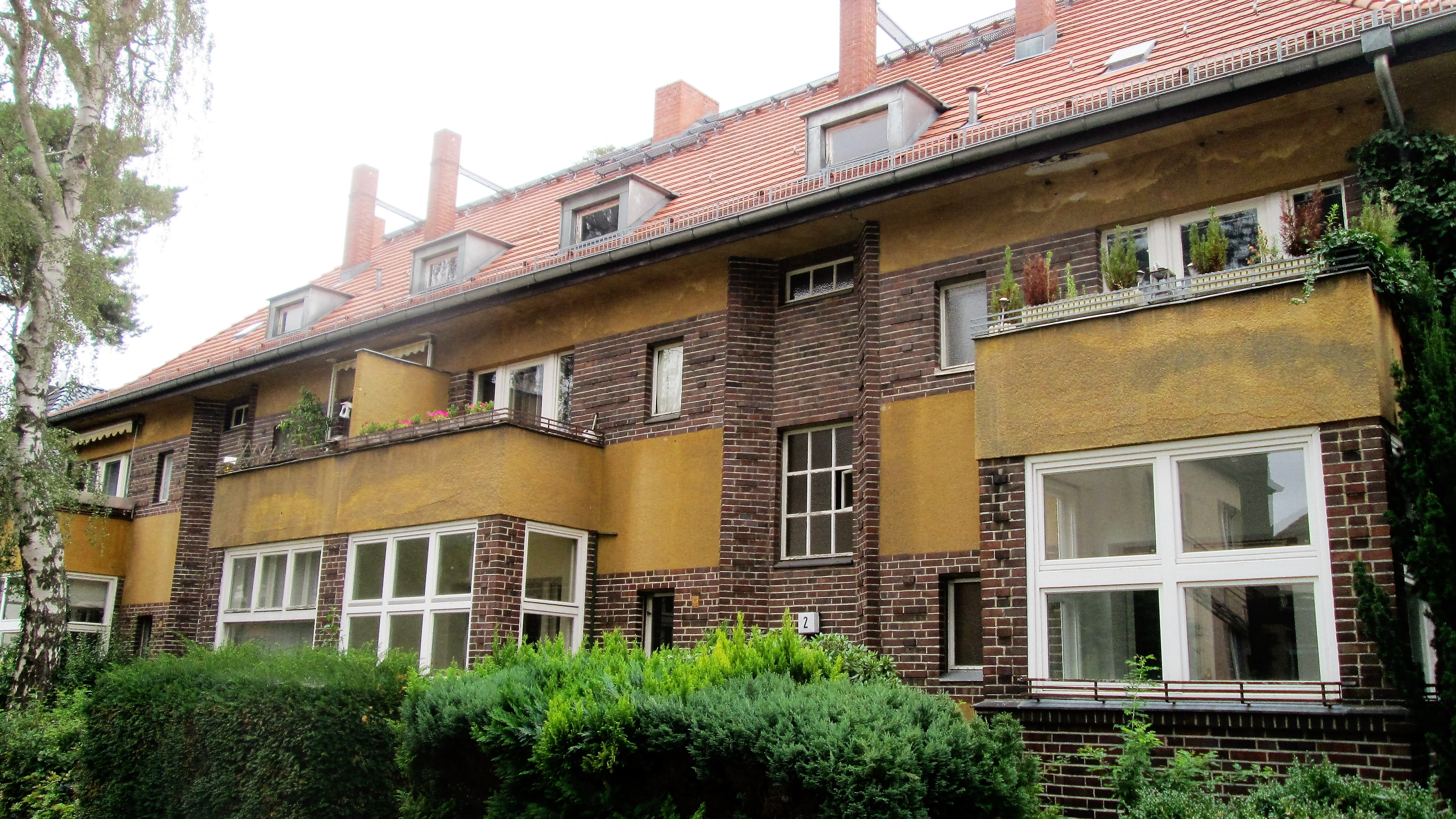 Doehlweg 2, Berlin-Hakenfelde (Waldsiedlung)